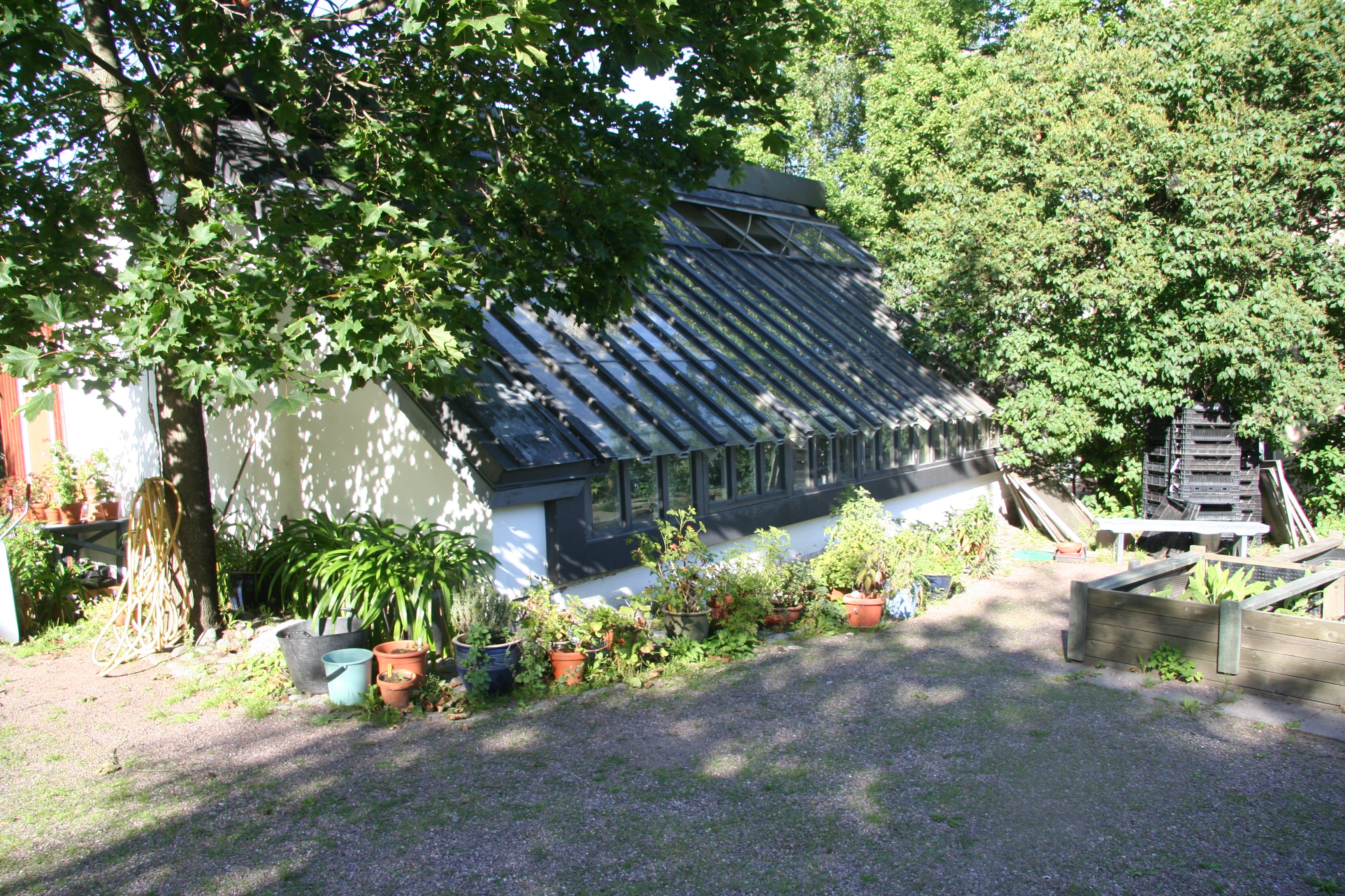 Annalan huvila, Helsinki. Vahna Orangerie.